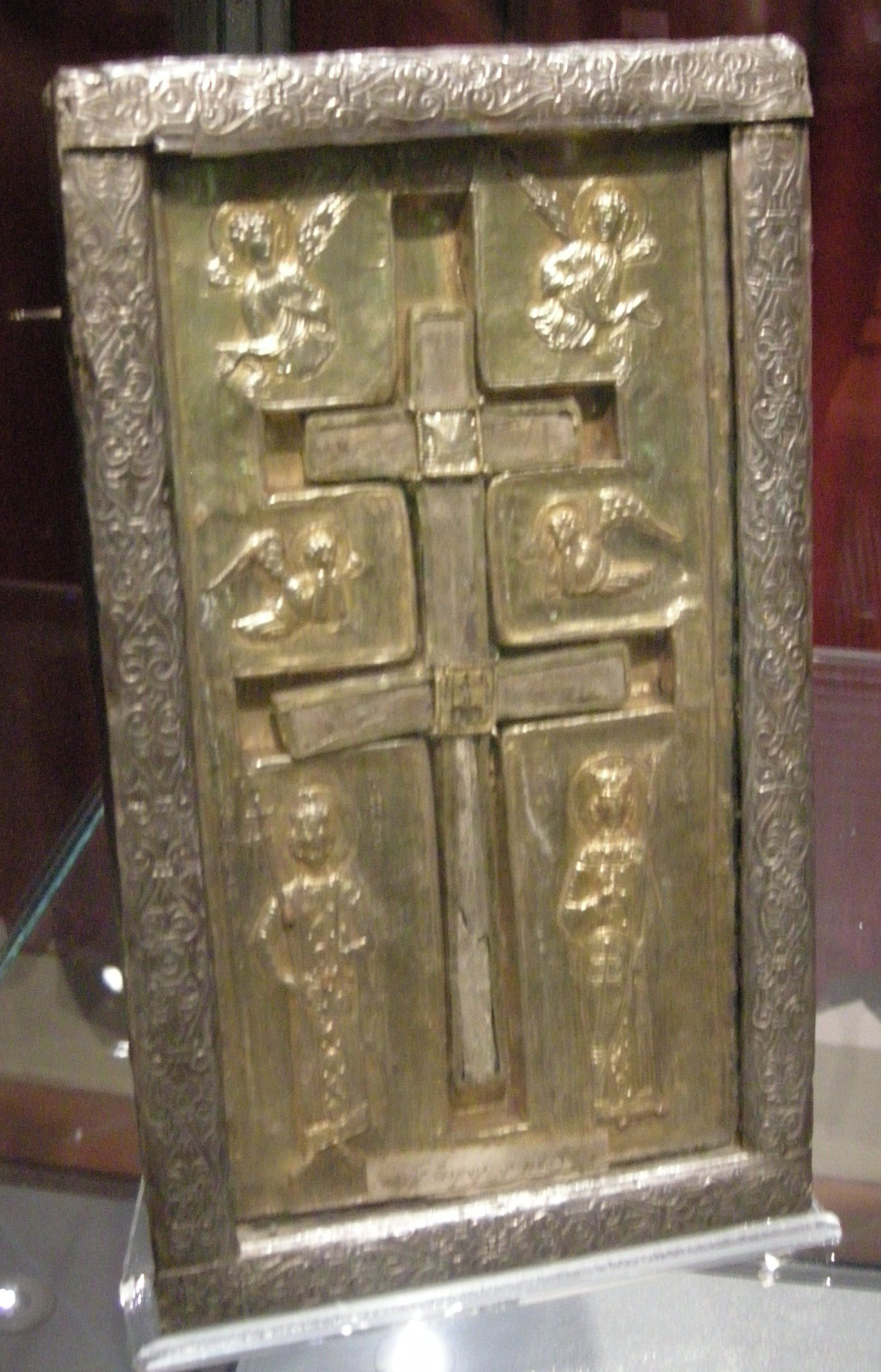 Museo diocesano nonantola, stauroteca a doppio traverso, fine XI-inizio XII sec